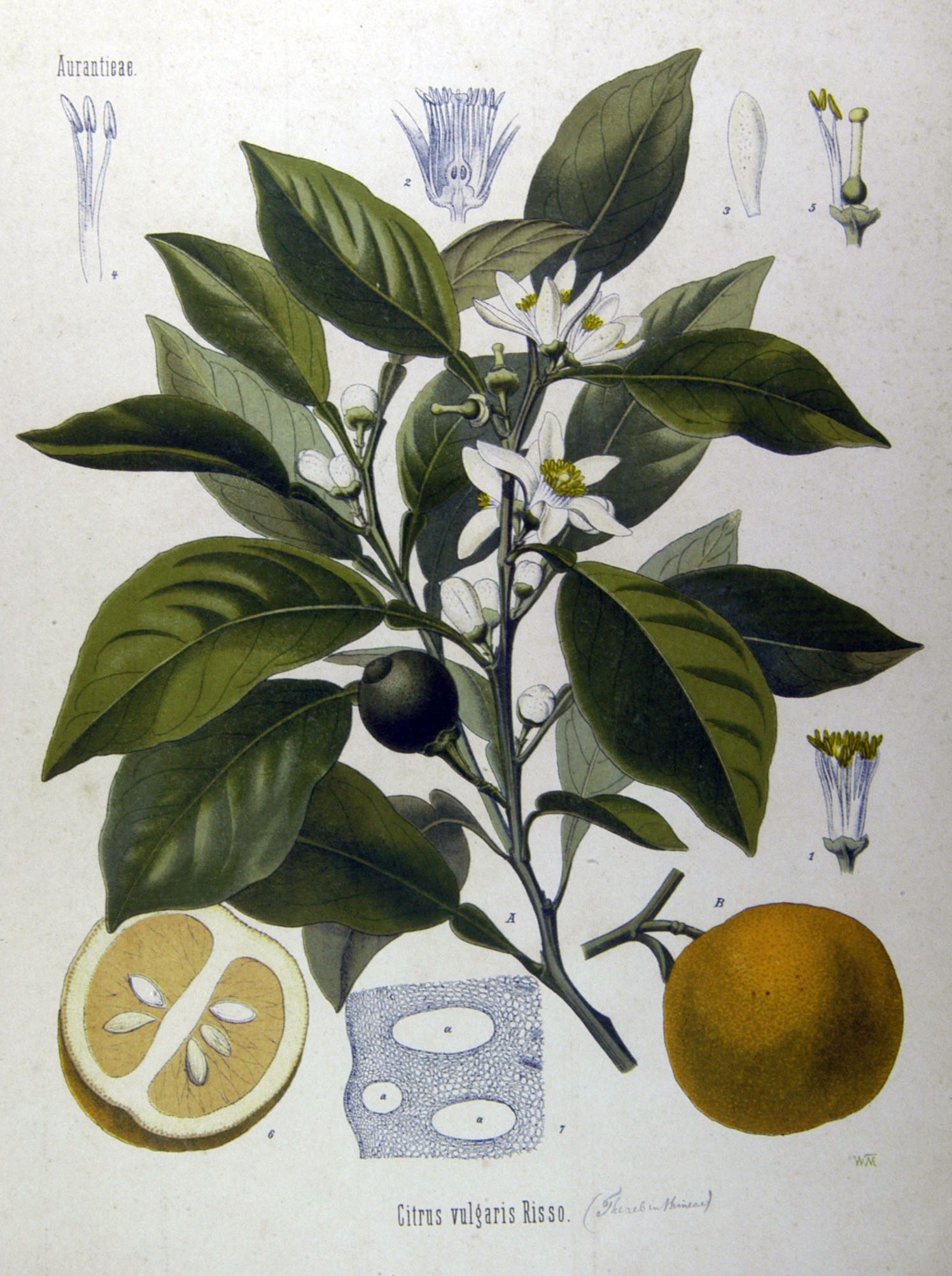 (Citrus vulgaris Risso / Citrus aurantium L.)